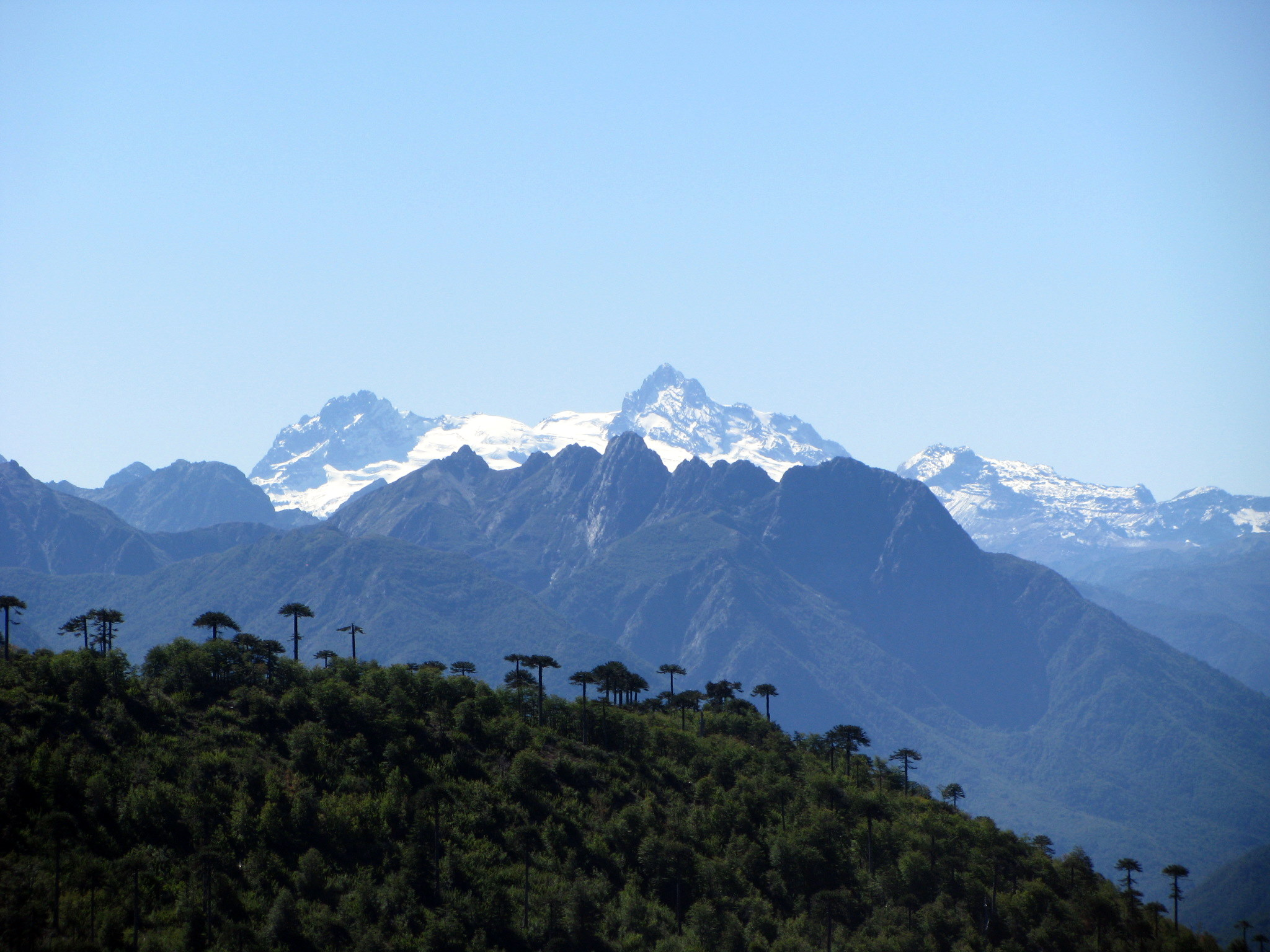 Reserva nacional Altos de Pemehue